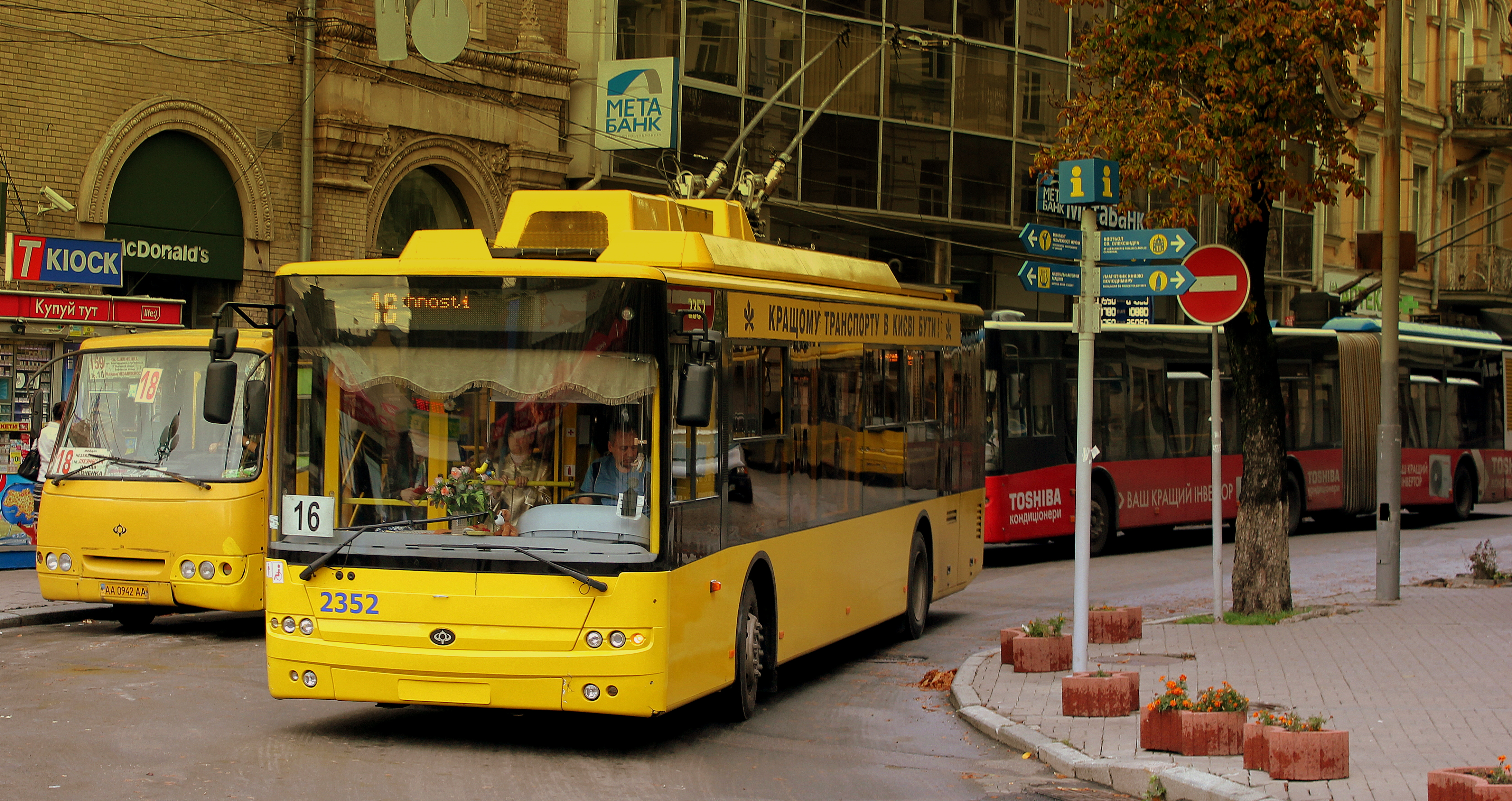 TROLLEY BUSSES KIEV UKRAINE SEP 2013